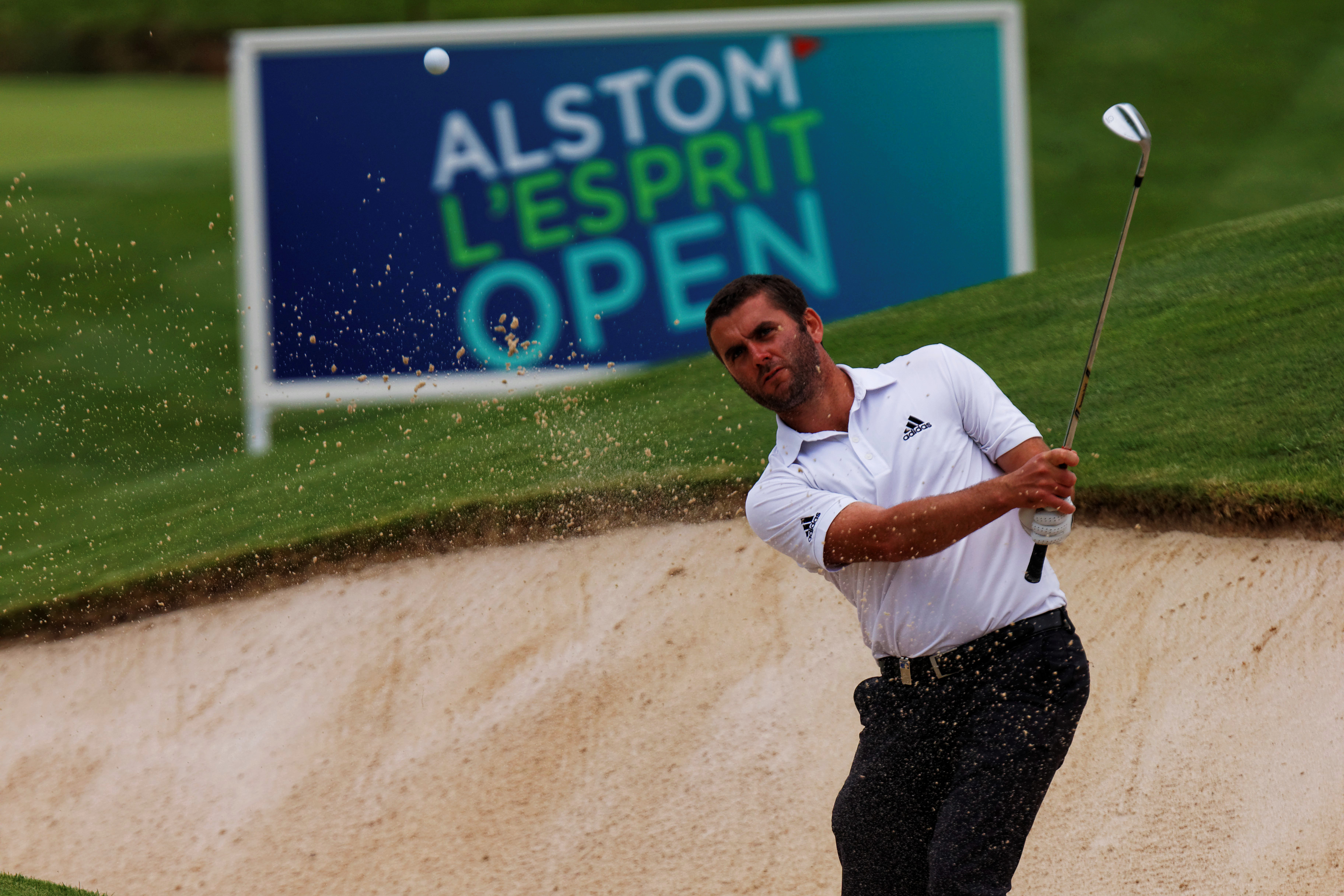 Andrew Mc Arthur lors de l'Open de France de golf 2014, dans le bunker du green du 18, Golf de St Quentin en Yvelines